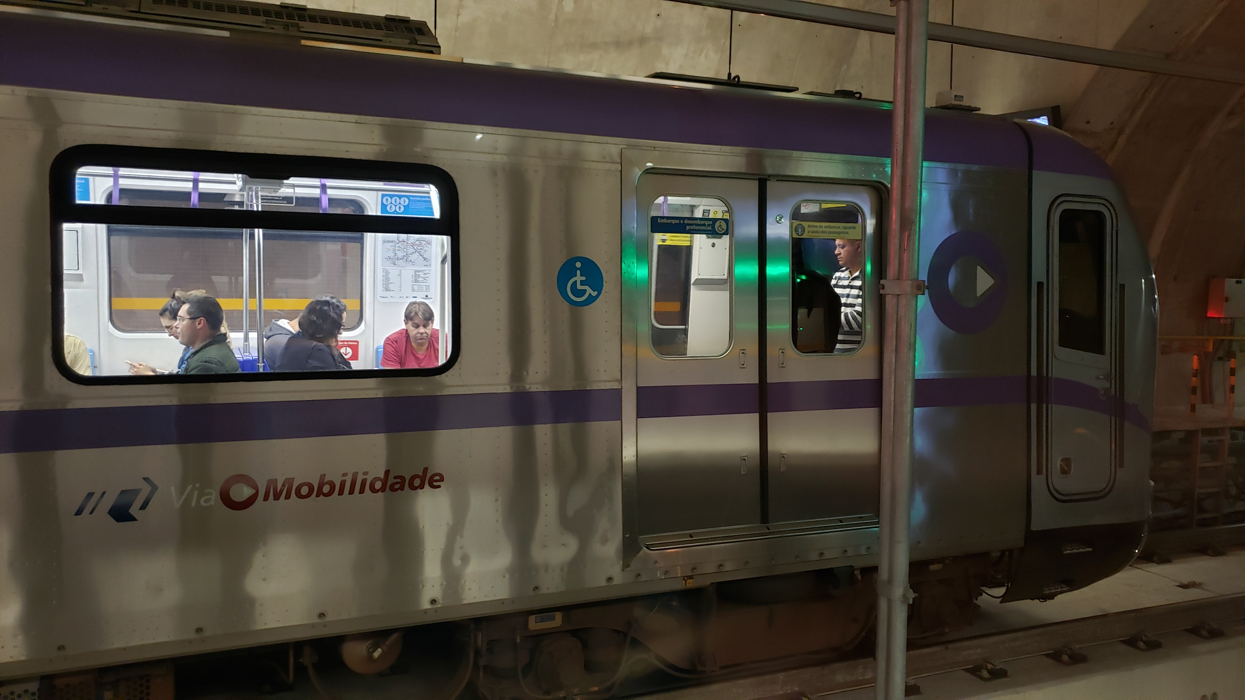 Imagem de uma composição da Frota P do Metrô de São Paulo após sua repintura para o padrão ViaMobilidade, alinhada na estação Santa Cruz em 08/10/2019.